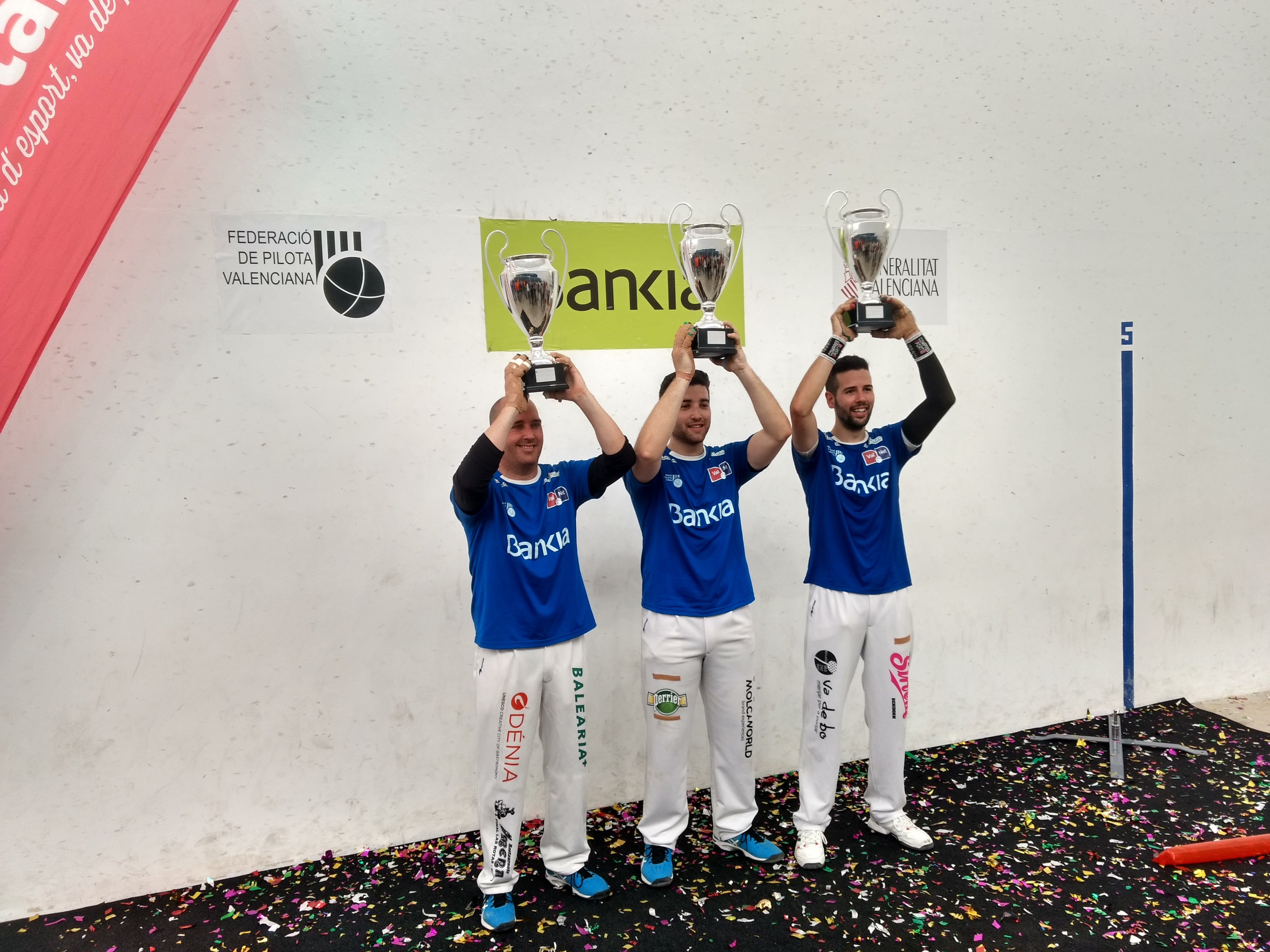 Fèlix, Monrabal i Pere Roc, amb els trofeus.